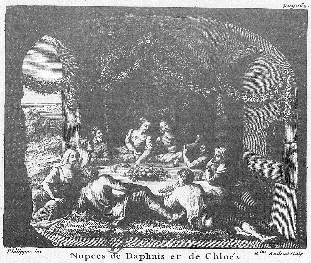 Noces de Daphnis et Chloé. Illustration de "Les Amours pastorales de Daphnis et Chloé"